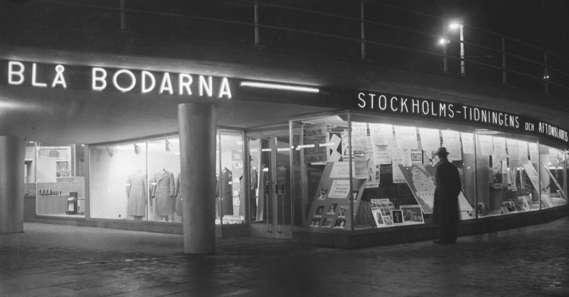 Skyltfönster för Stockholms-Tidningen och Aftonbladet vid Blå Bodarna, Slussen